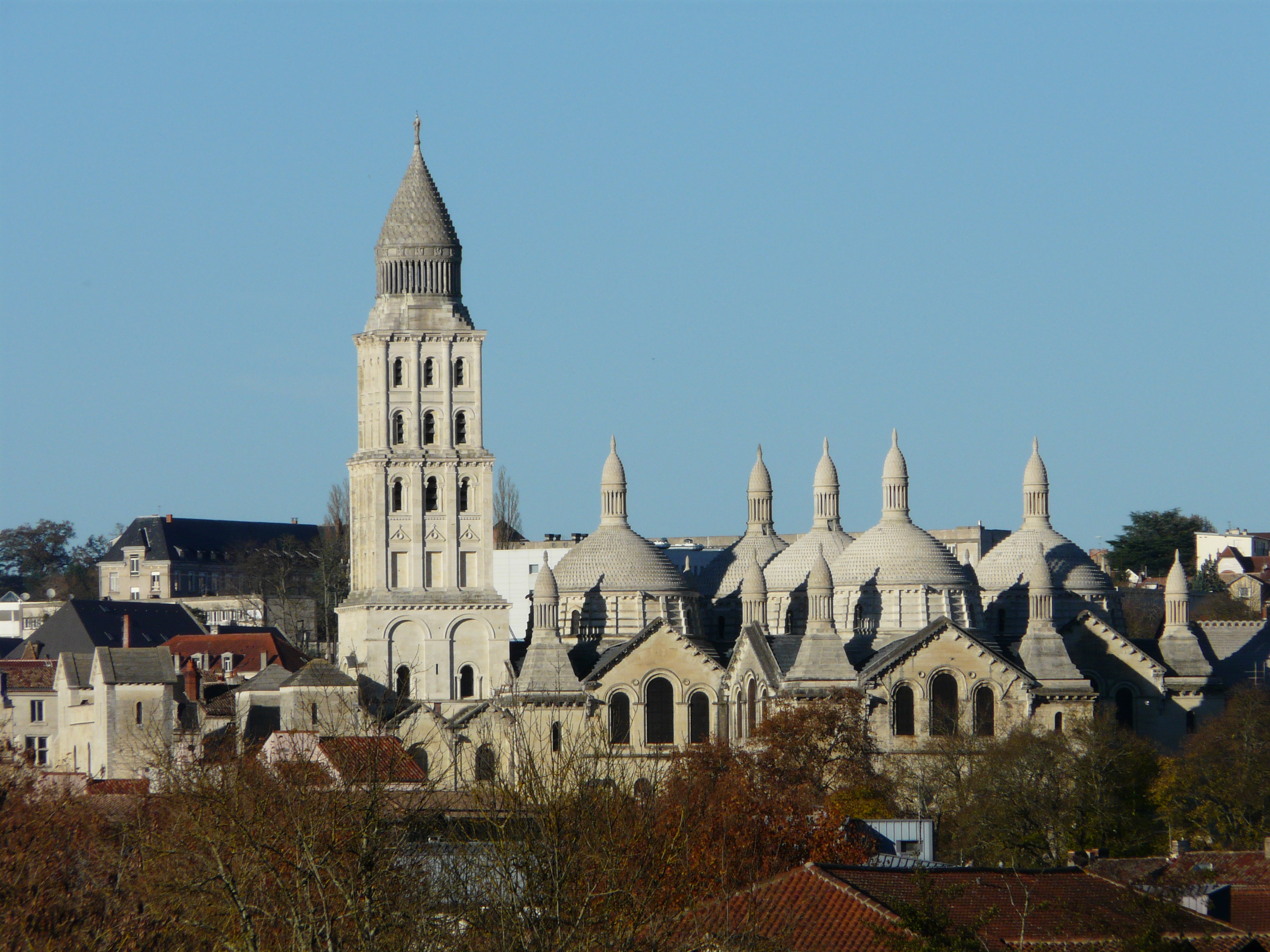 Le côté sud de la cathédrale Saint-Front, Périgueux, Dordogne, France.